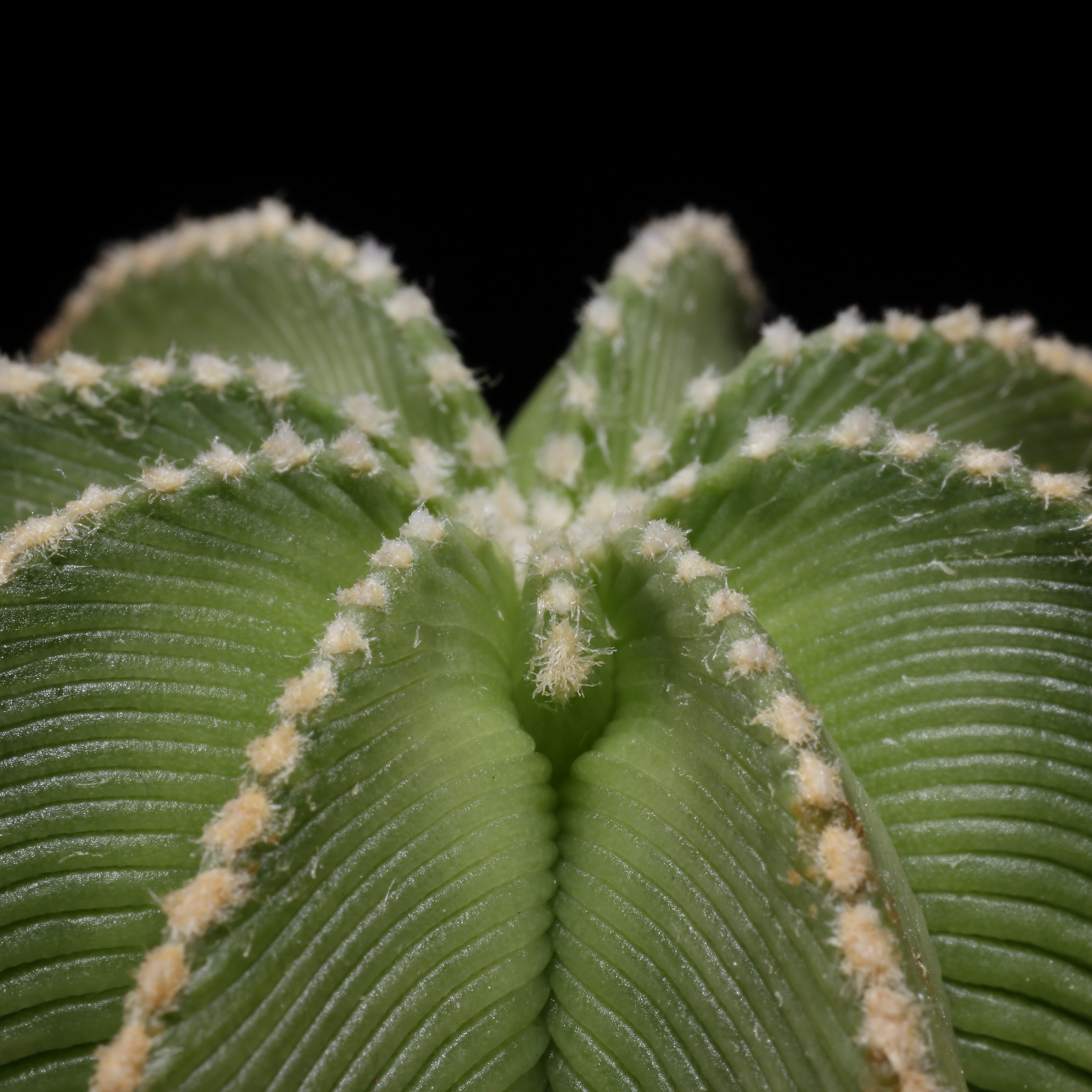 Ny ås som bildas på en Aztekium hintonii.